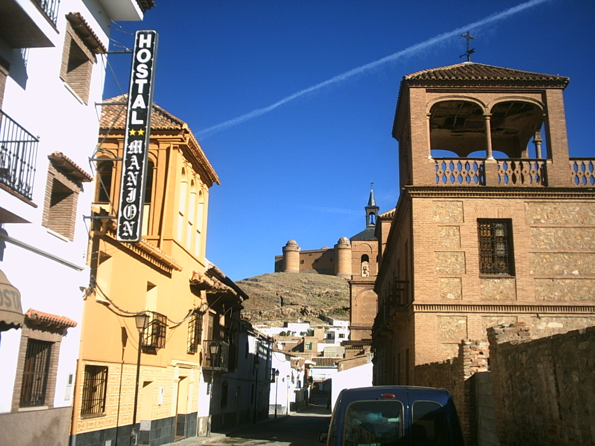 La Calahorra, Granada. España